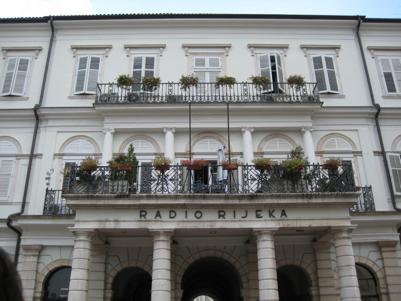 Zgrada Radio Rijeke (arhitekt Antun Deseppi), čija je gradnja odobrena 25. travnja 1845. godine. Rijeka, Croatia